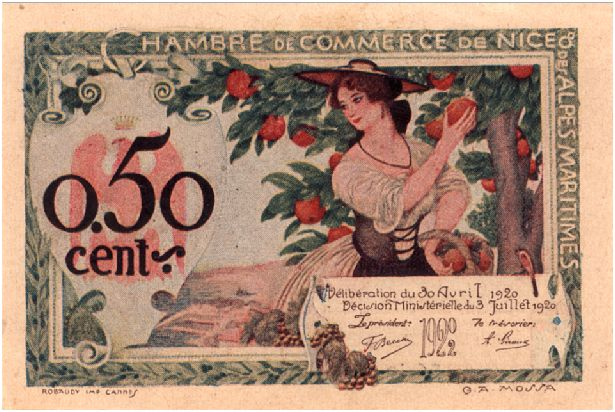 billet bancaire